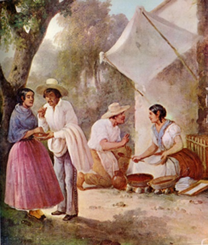 Foto de pintura del siglo XIX